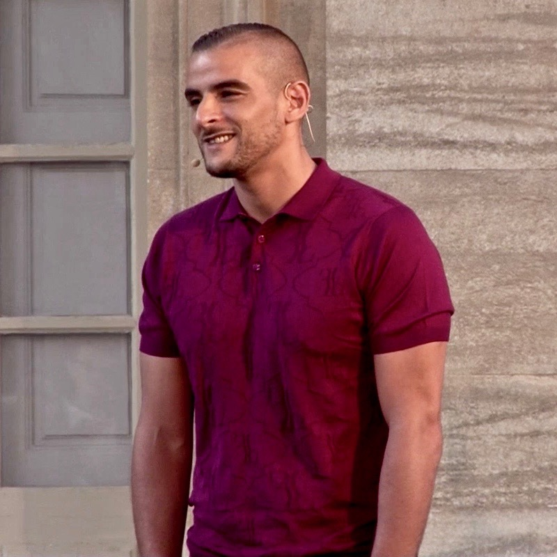 Sofiane Zermani dans Le Magnifique au Festival d'Avignon 2018